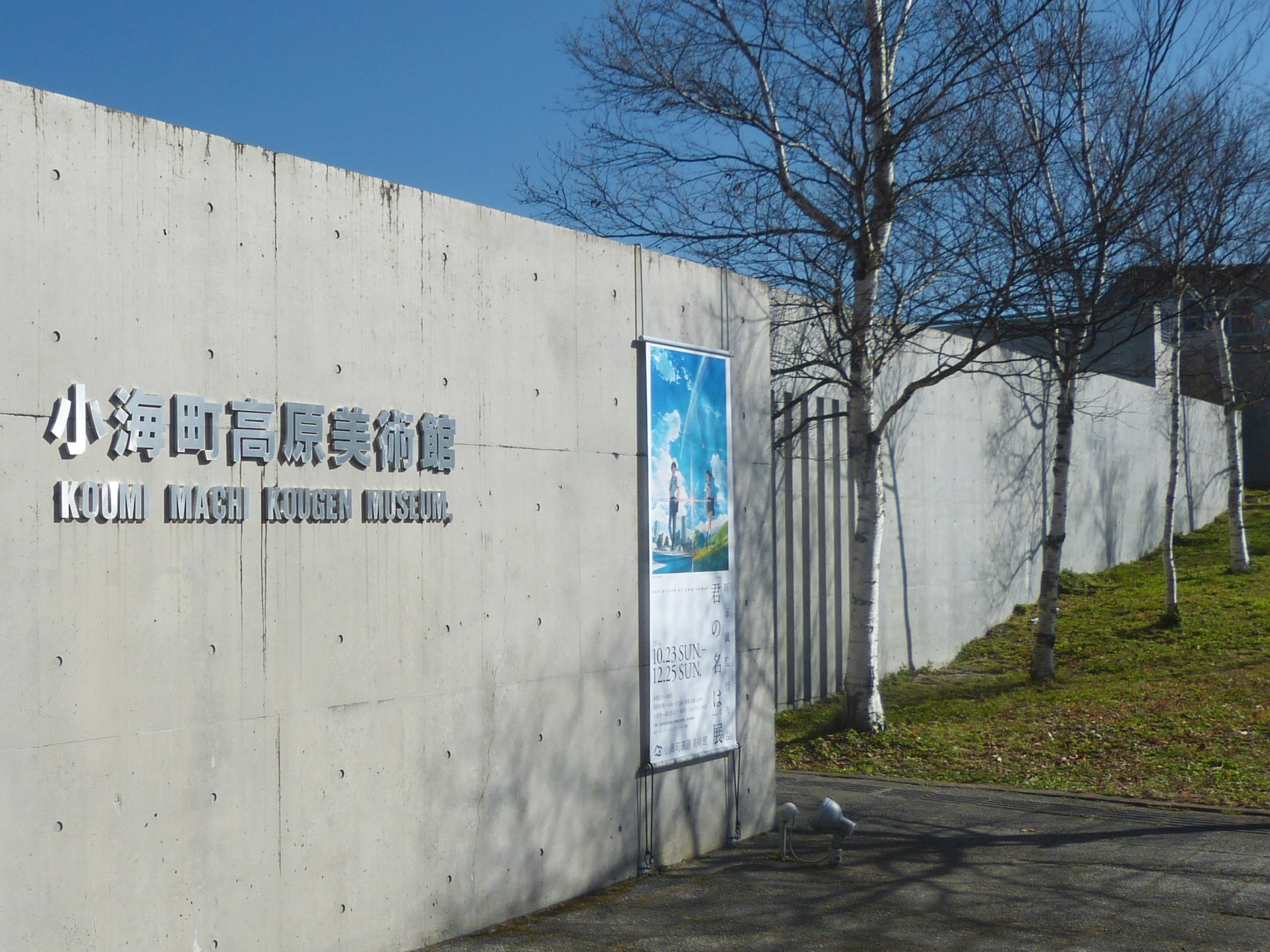 「君の名は。」展を開催中の小海町高原美術館 (新海誠監督の出身地、長野県小海町)